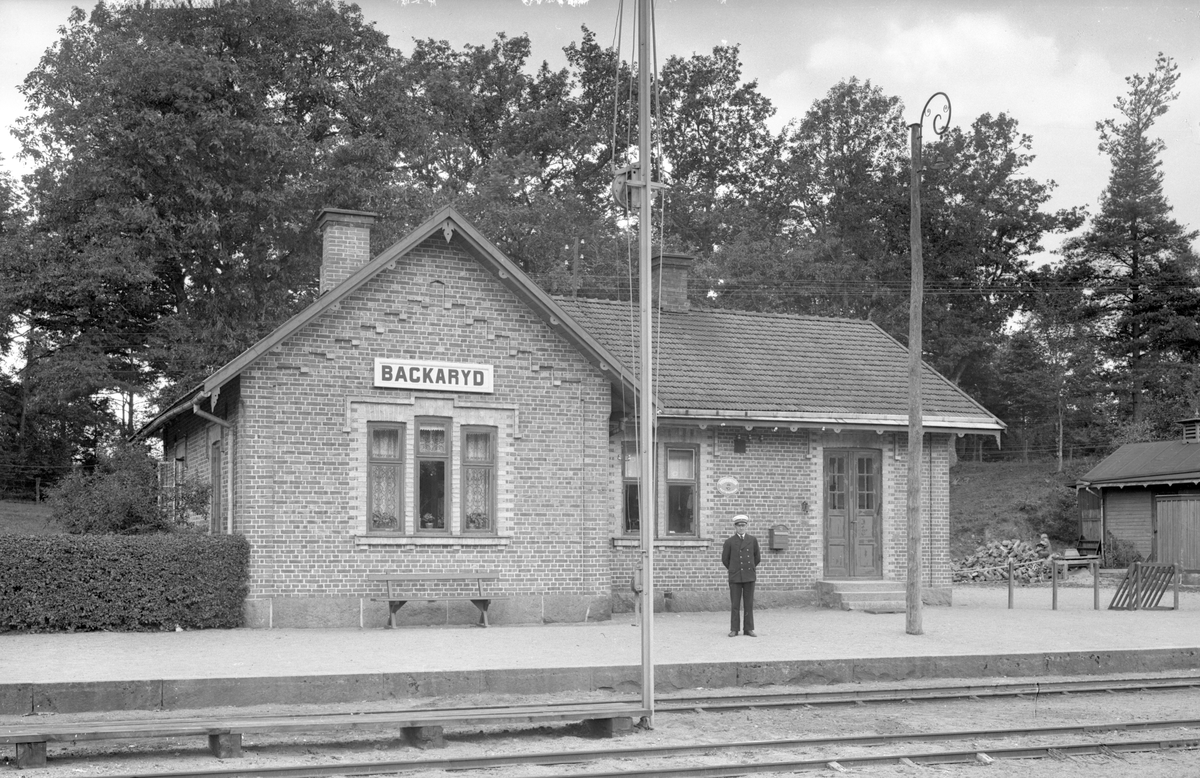 Fotografi av Backaryds järnvägstation under 1940 med den smalspåriga Bredåkra-Tingsryds järnväg i förgrunden. Fotografering av Holmér, K A ur Järnvägsmuseets samlingar.